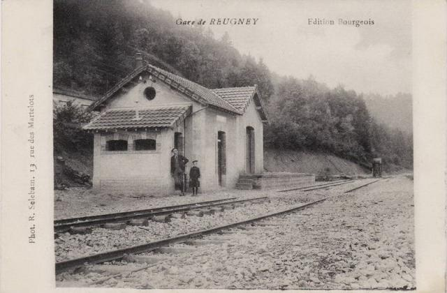 Modèle de gare commun à Pugey et Reugney